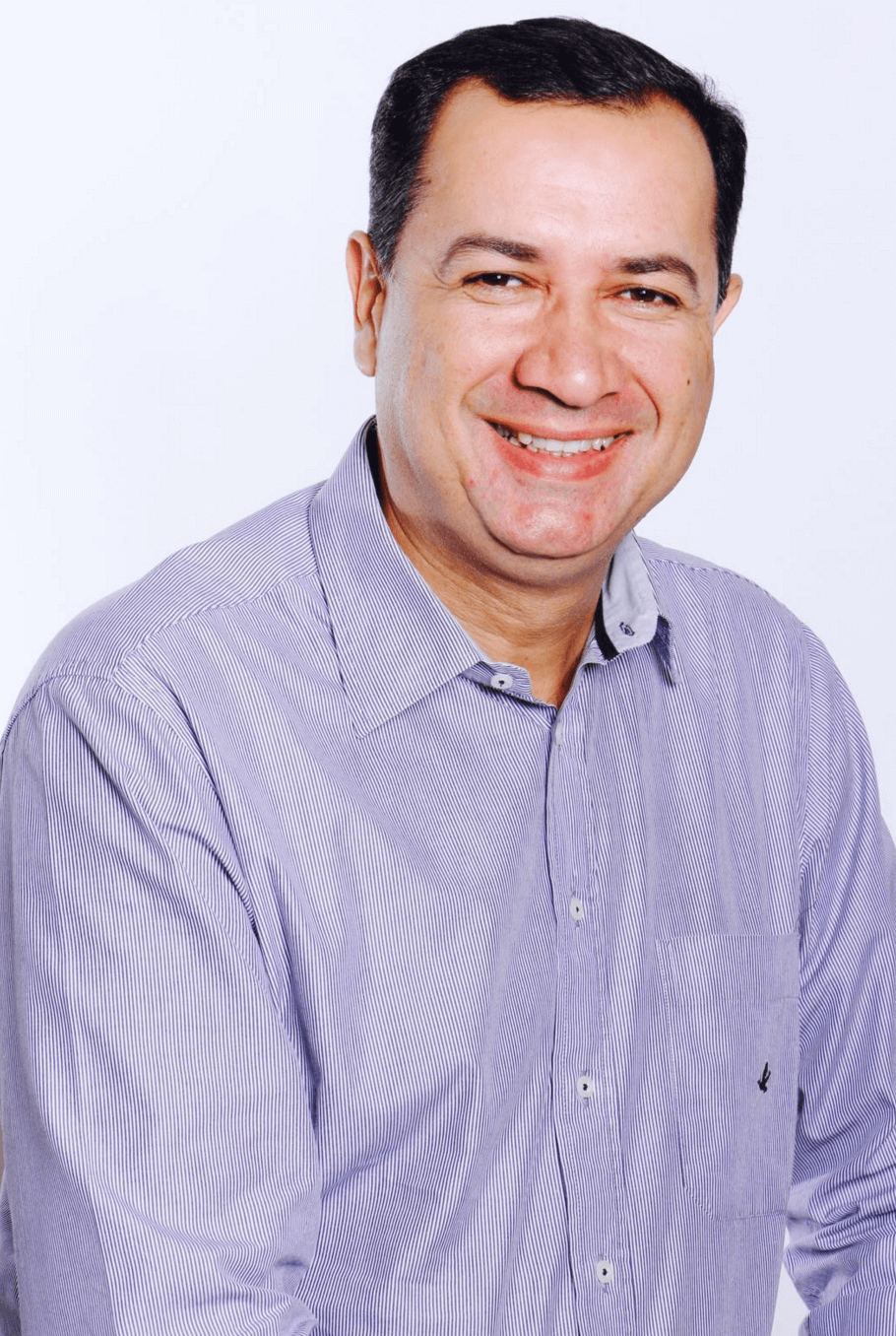 Prefeito de Águas Lindas de Goiás, Hildo do Candango